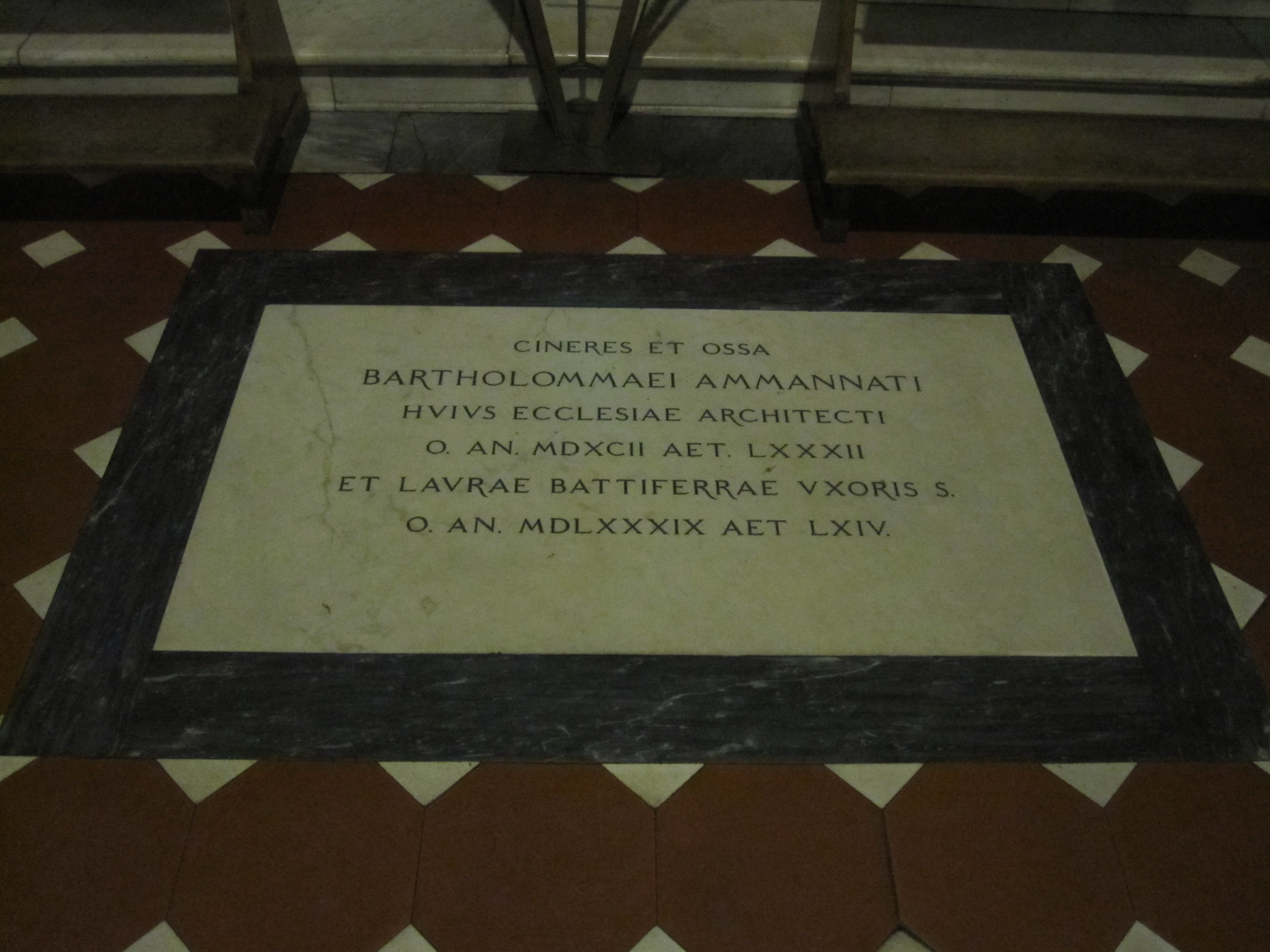 Letze Ruhesstätte von Bartolomeo Ammanati in der Kirche San Giovannino degli Scolopi in Florenz